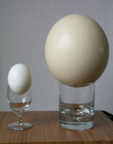 Ei van kip en ei van struisvogel, eigen foto E van Herk 28/3/2004. Gemaakt met Olympus C5050 zoom Categorie:Afbeelding vogel